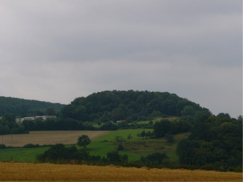 Das Foto zeigt den so genannten "Galgenküppel", einen der zum Zehngericht Bieberstein gehörenden Galgenberge. Das Foto wurde von der Anhöhe zwischen den Orten Egelmes und Rödergrund, beides Ortesteile von Hofbieber aufgenommen